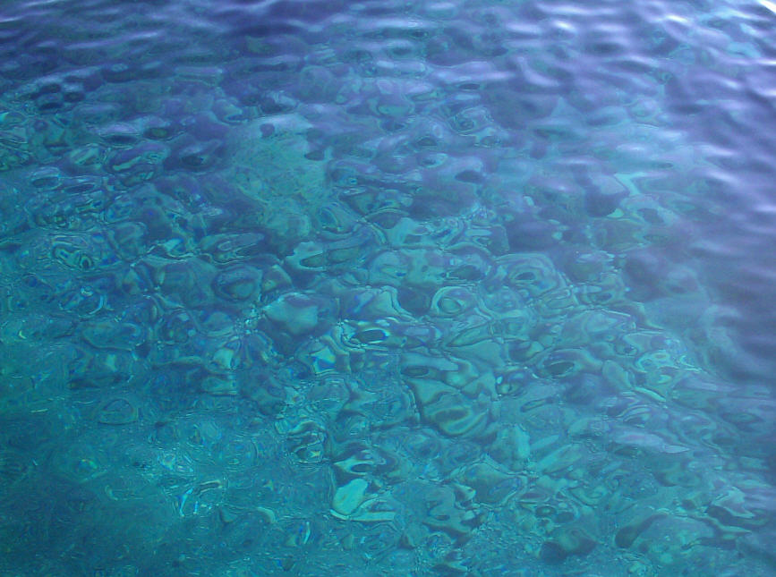 Cala Bona, Son Servera, Mallorca